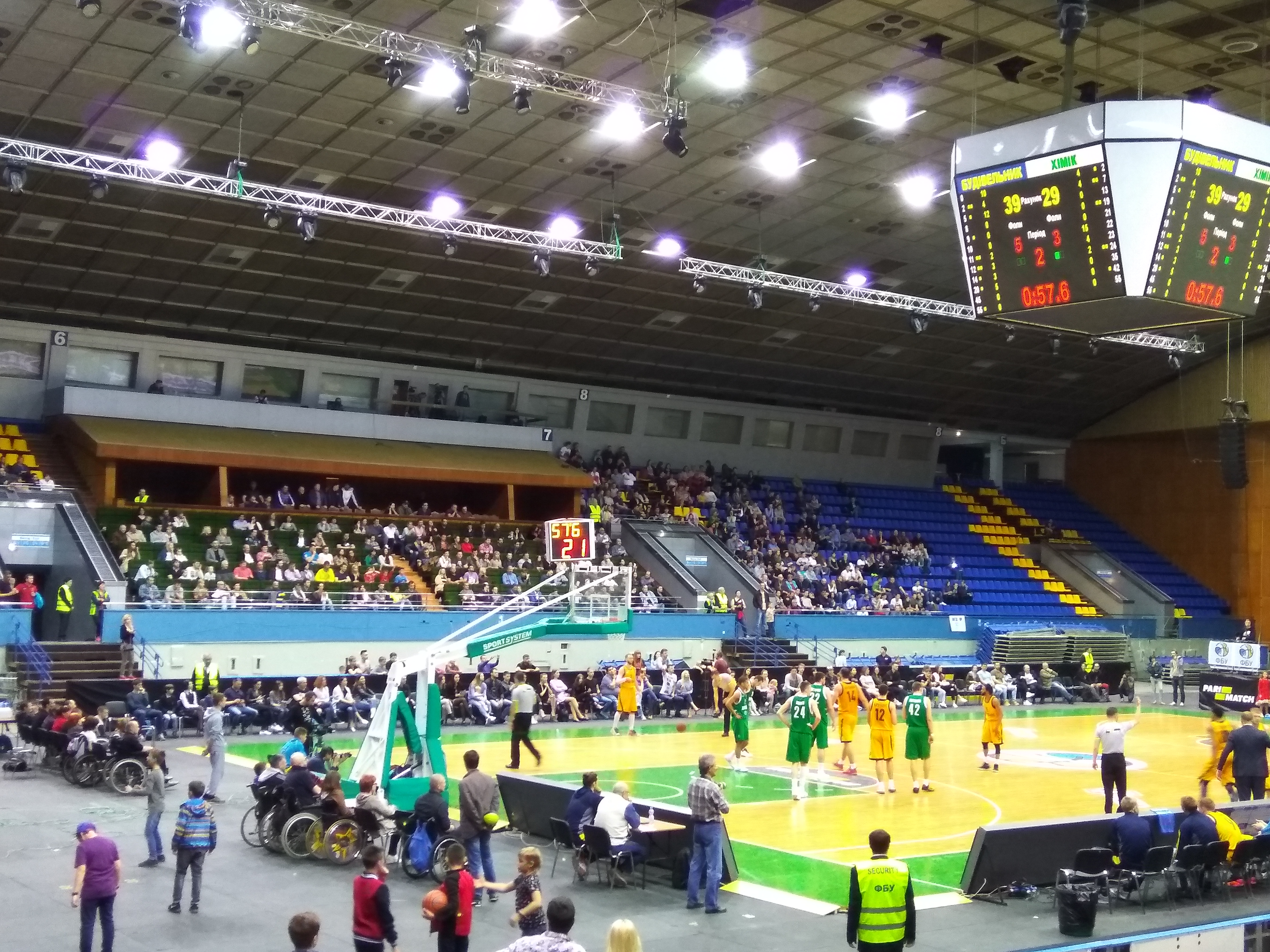 Фінал Української баскетбольної суперліги. Будівельник - Хімік.